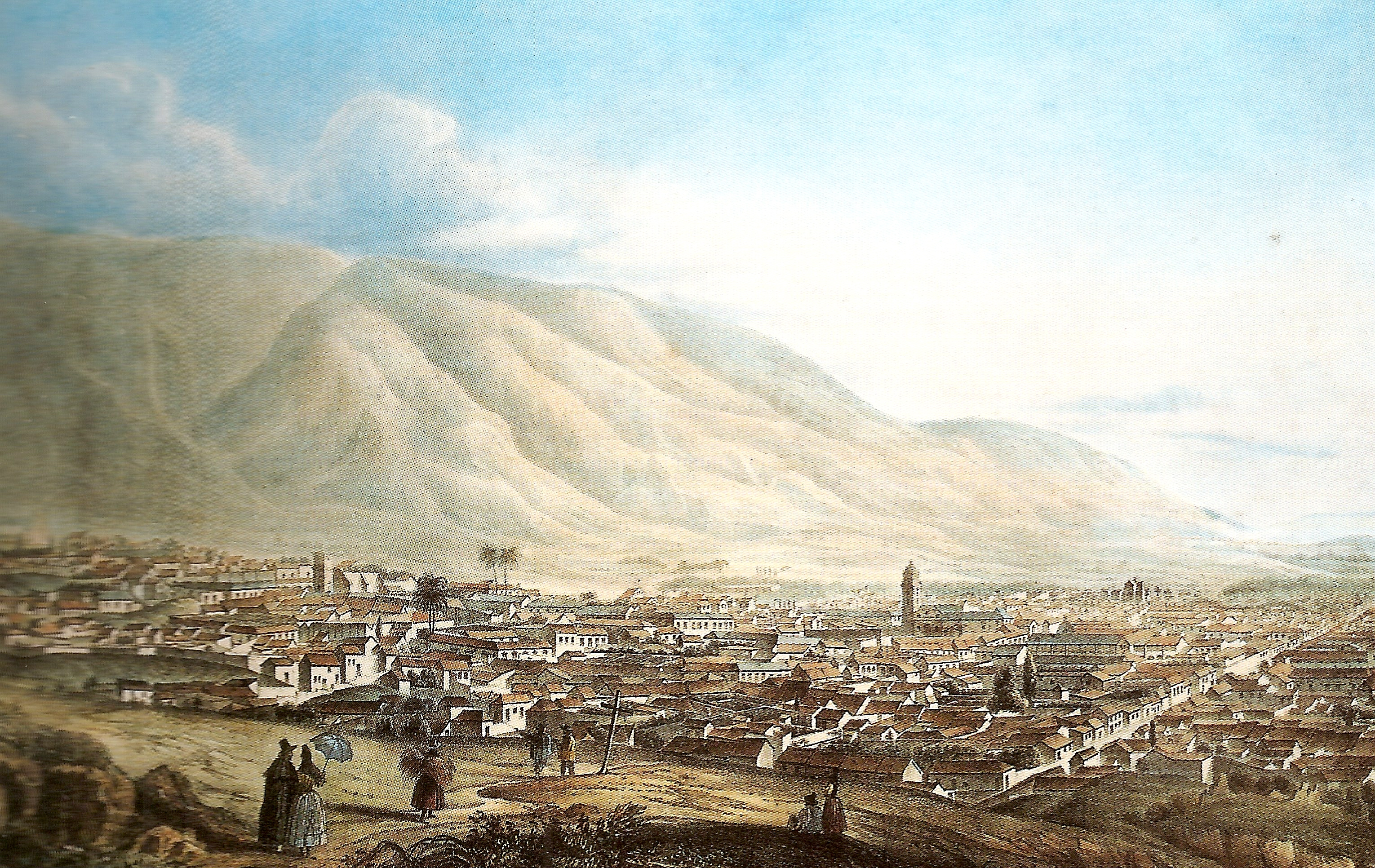 "En la Vista de la ciudad de Caracas, del inglés Joseph Thomas - pintor que, según las investigaciones de Alfredo Boulton, entró y salió del país con bastante frecuencia entre los años 1837 y 1844 - podemos observar con relativa precisión, además de la grandiosidad del paisaje natural y sus inmensas proporciones, el emplazamiento general de la ciudad, las diferencias volumétricas y escala de las edificaciones. Su imagen de Caracas, la única obra artística que ha sido identificada con su nombre, es una de las más descriptivas de la extensión y la forma de la ciudad porque, aunque la mirada del autor se centra, como en las imágenes anteriores, en la grandiosidad natural, en ella también se observan detalles arquitectónicos y un registro de las residencias capitalinas más importantes; esto sigue un modelo tradicional europeo de las visiones topográficas donde, a modo de leyenda, se enumeraban las edificaciones o monumentos. La apariencia general sigue siendo ordenada, limpia y con una atmósfera serena, no del todo acorde con nuestro ambiente tropical. Es una diferencia que bien señala Palenzuela: "El grabado de Thomas está lleno de detalles: muros, casas, patios, iglesias, calles, palmeras, ruinas, la extraordinaria montaña y, por si fuera poco, algunos modales en el vestir citadino. Su atmósfera es propia de un clima frío. Las construcciones parecen sólidas. La vida se muestra apacible"" Carola Bravo. 2008: Tres visiones de Caracas. La ciudad decimonónica a través de sus testimonios pictóricos y gráficos Argos v.25 n.48 Caracas jun. 2008. Argos versión impresa ISSN 0254-1637